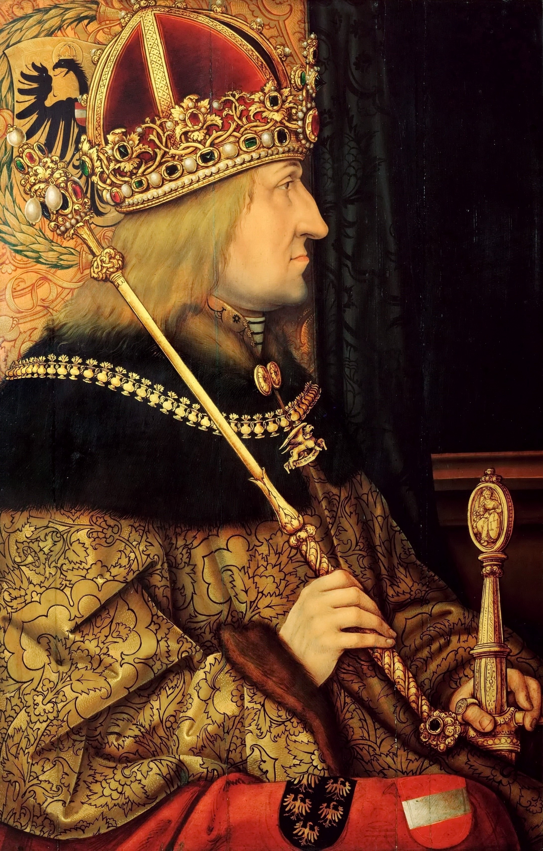 Kaiser Friedrich III. (1415-1493), nach einem verlorenen Original von 1468